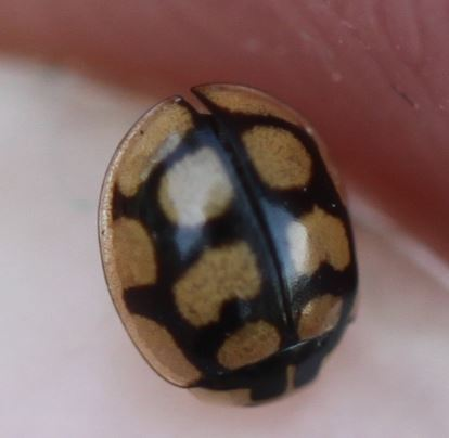 Marienkäfer Oenopia lyncea lyncea am 2. Juli 2019 an der Côte d’Azur